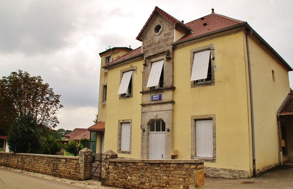 La Mairie de Chilly-sur-Salins.